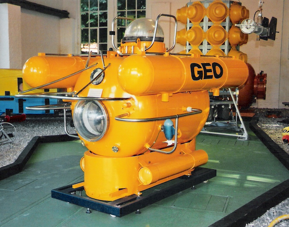 Tauchboot "Geo", hier noch im Nautineum Stralsund